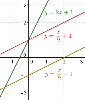 3 прави - експлицитни